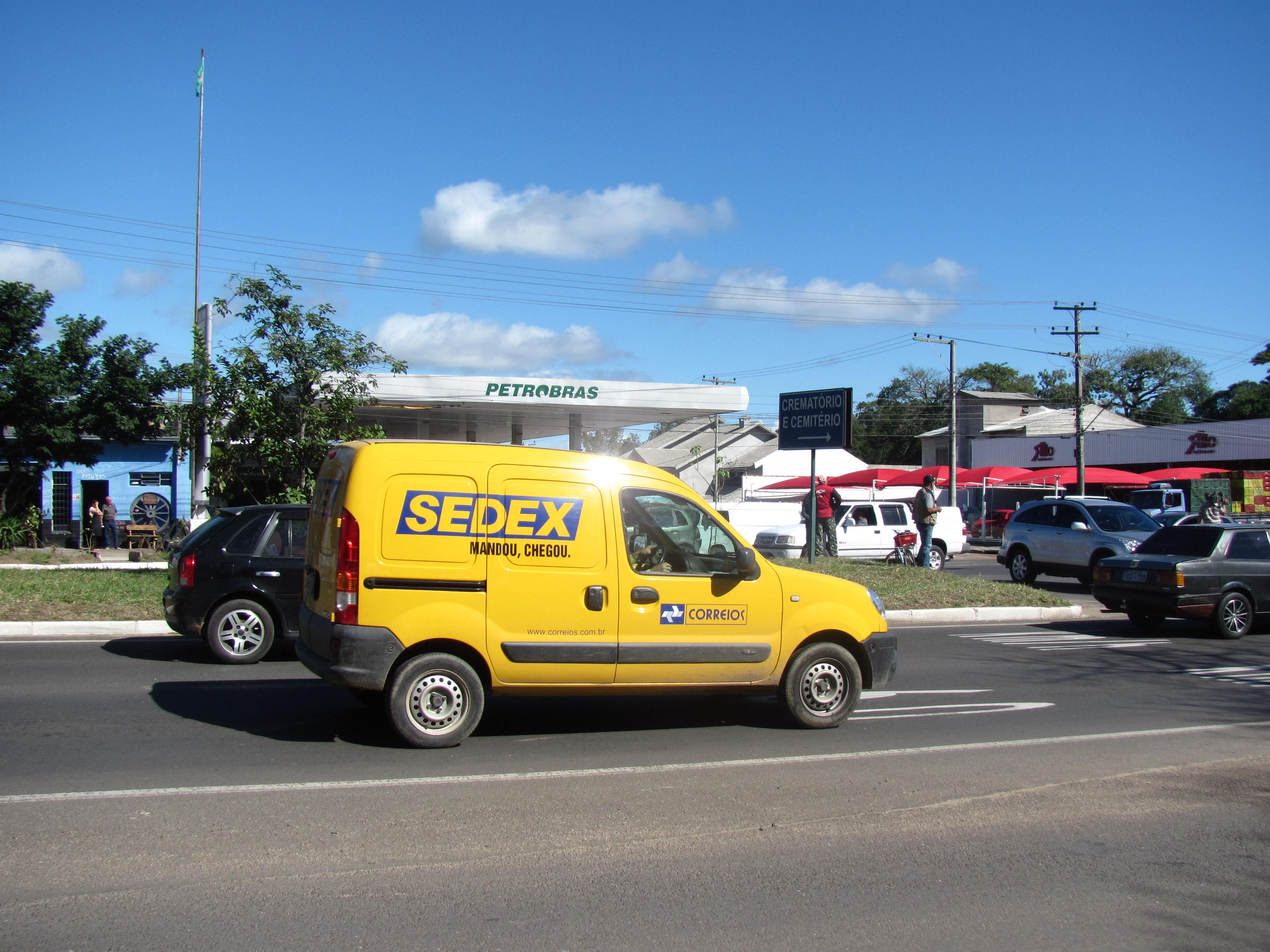 Português do Brasil: Sedex em Viamão